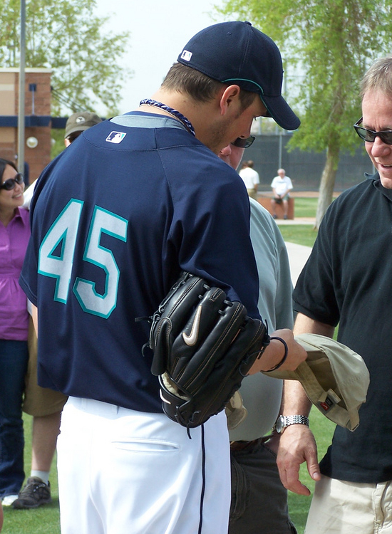 Érik Bédard